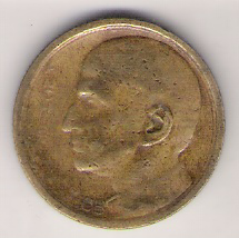 Uma moeda de 1000 Réis cunhada em 1938. À esquerda do rosto, lê-se Anchieta. This graphic was created with GIMP.